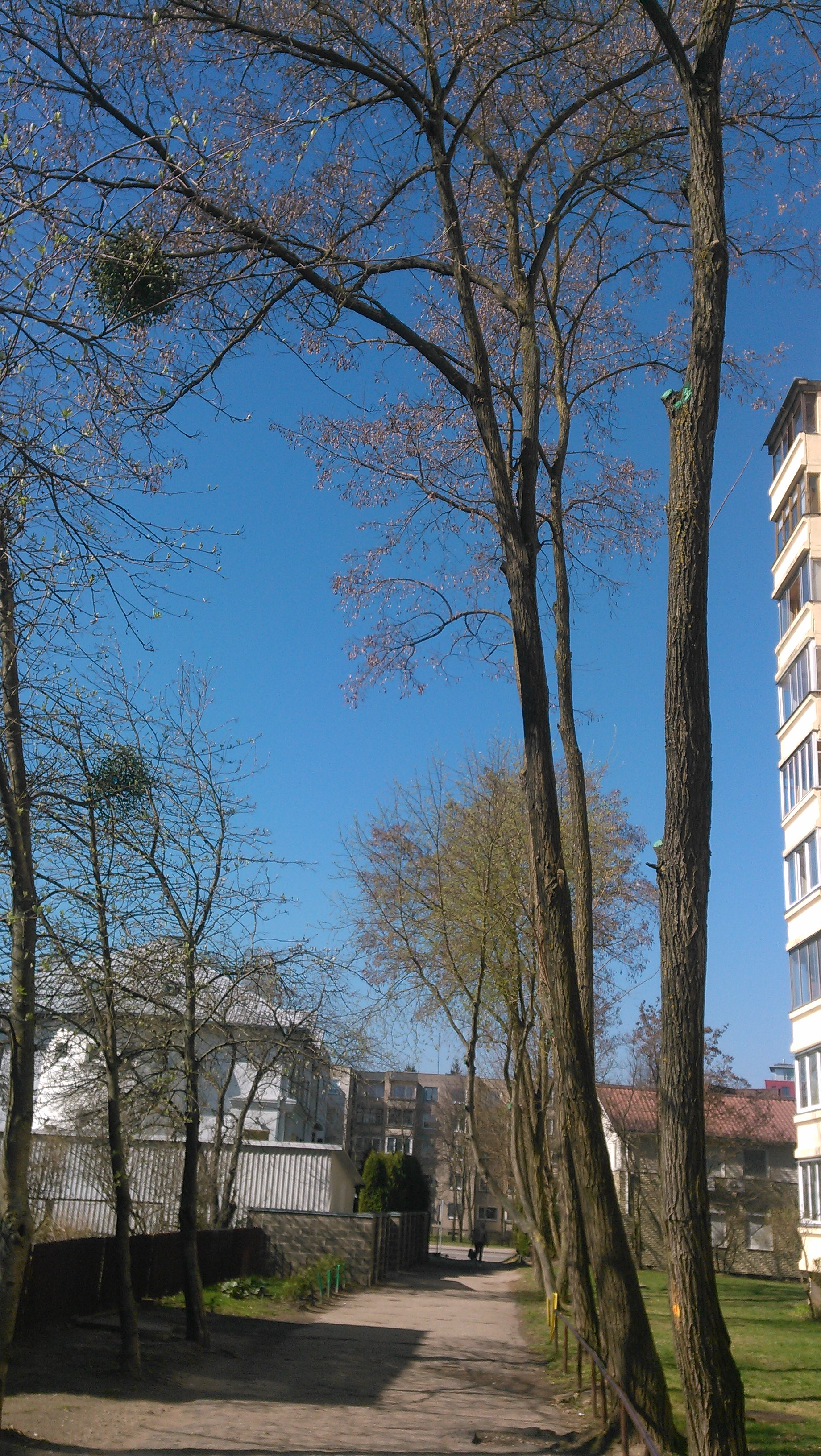 Kaune